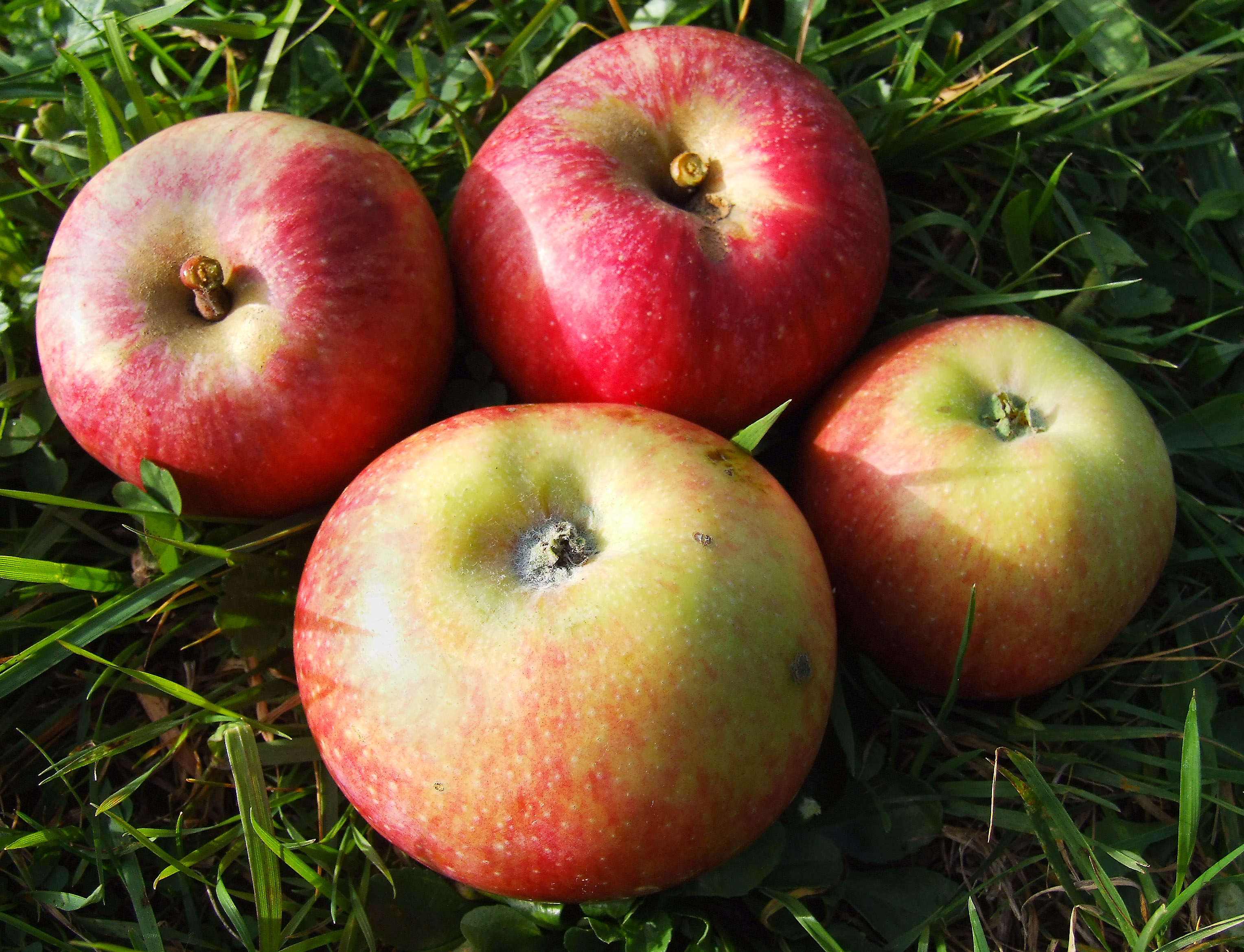 Apfel Jakob Fischer